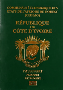 Photo du passeport ivoirien